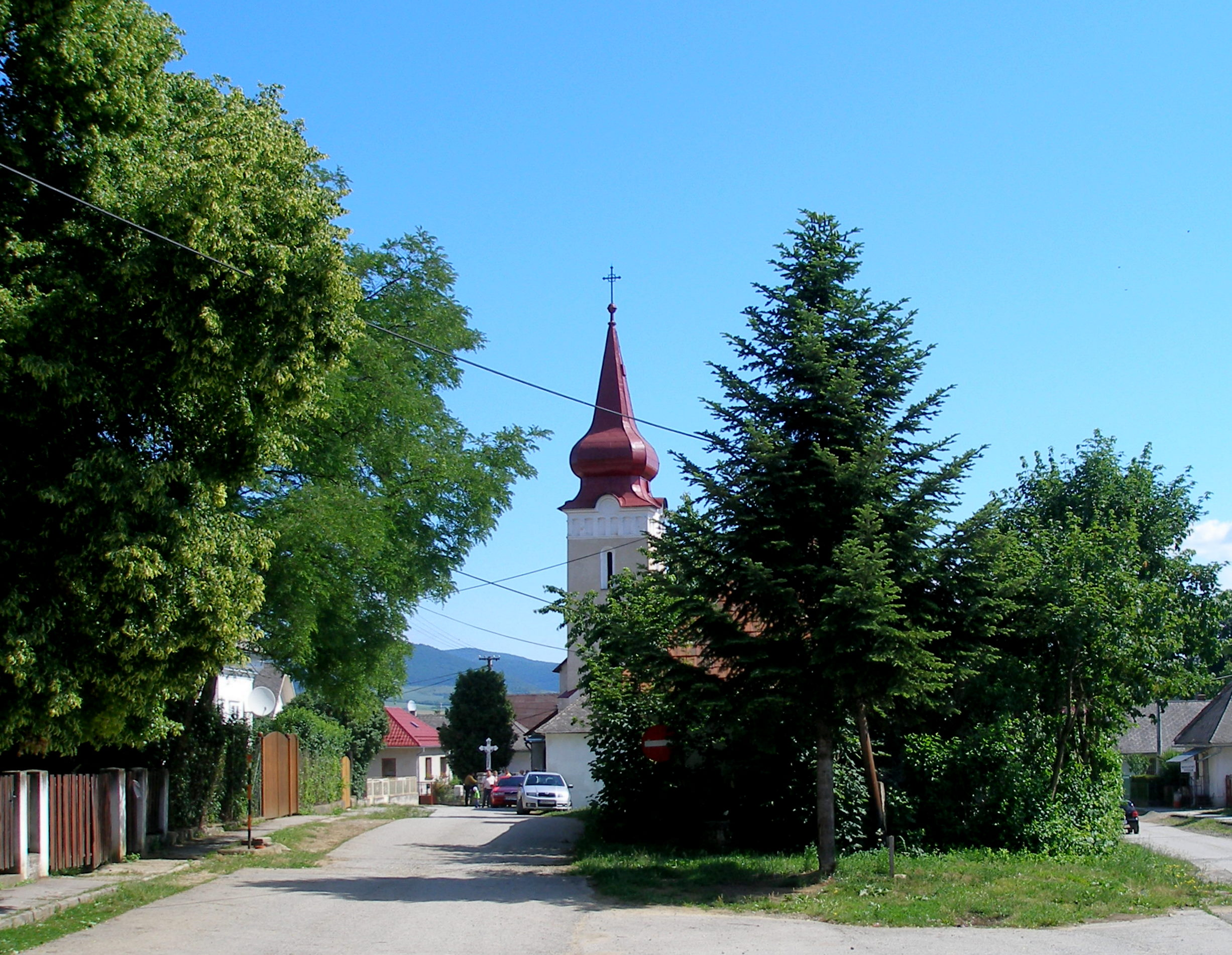 Obec Ostrovany okres Sabinov